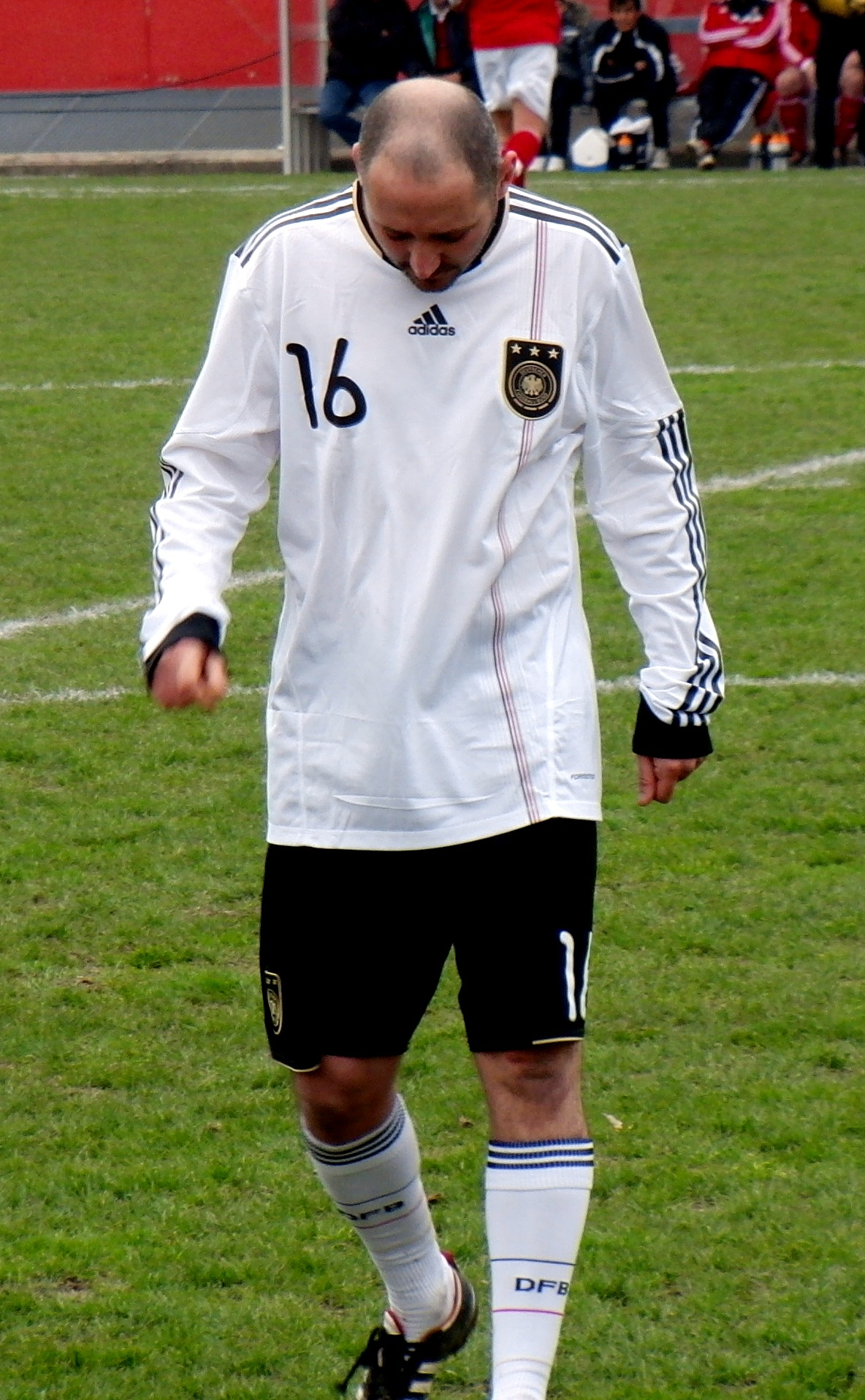 Oliver Neuville beim Legendenspiel Schweiz-Deutschland am 23. März 2013 auf der Schützenwiese in Winterthur.